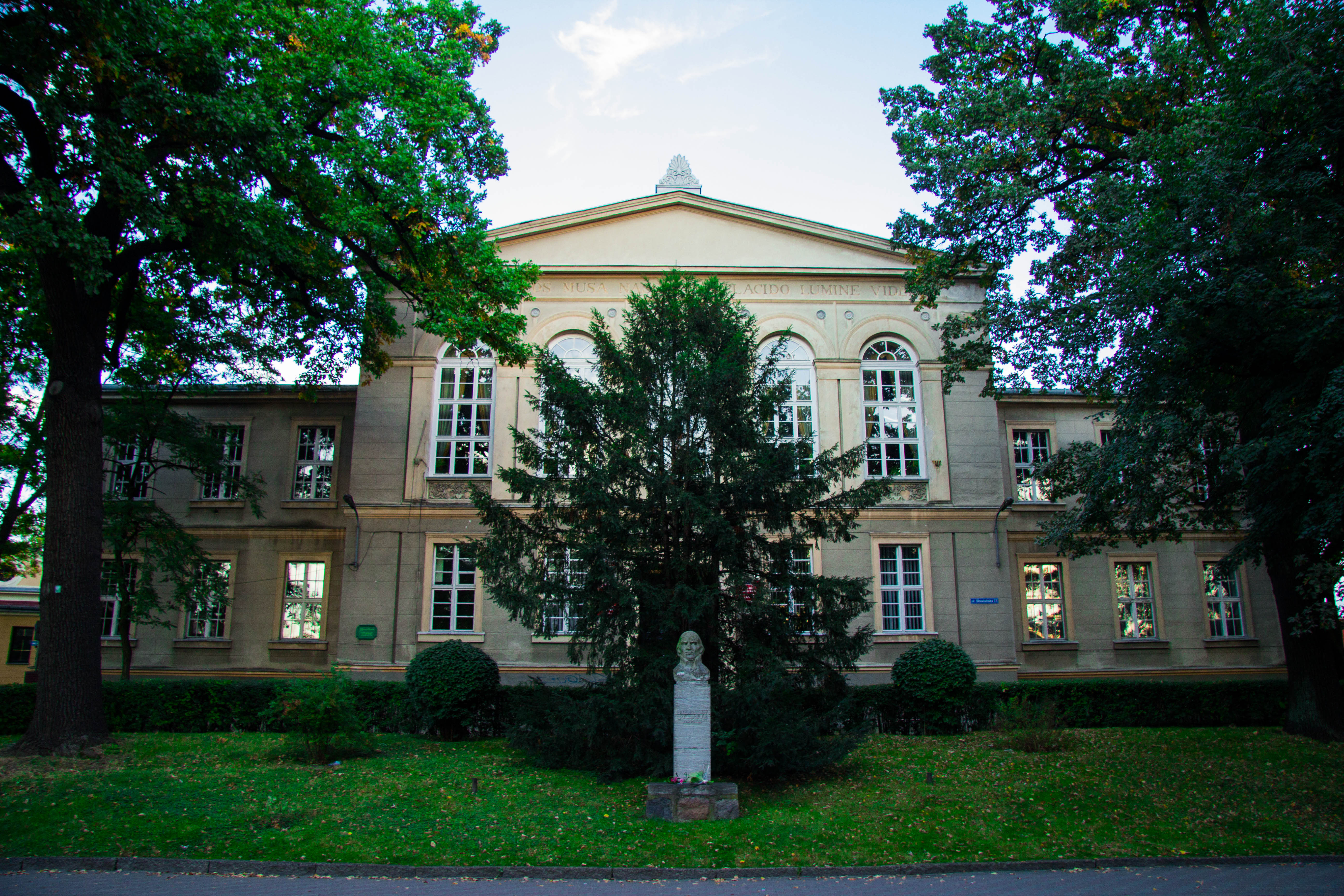 Kwidzyn, ul. Słowiańska 17 - dawniej pałac, później gimnazjum F. Schillera, obecnie zespół szkół, 1835-1838